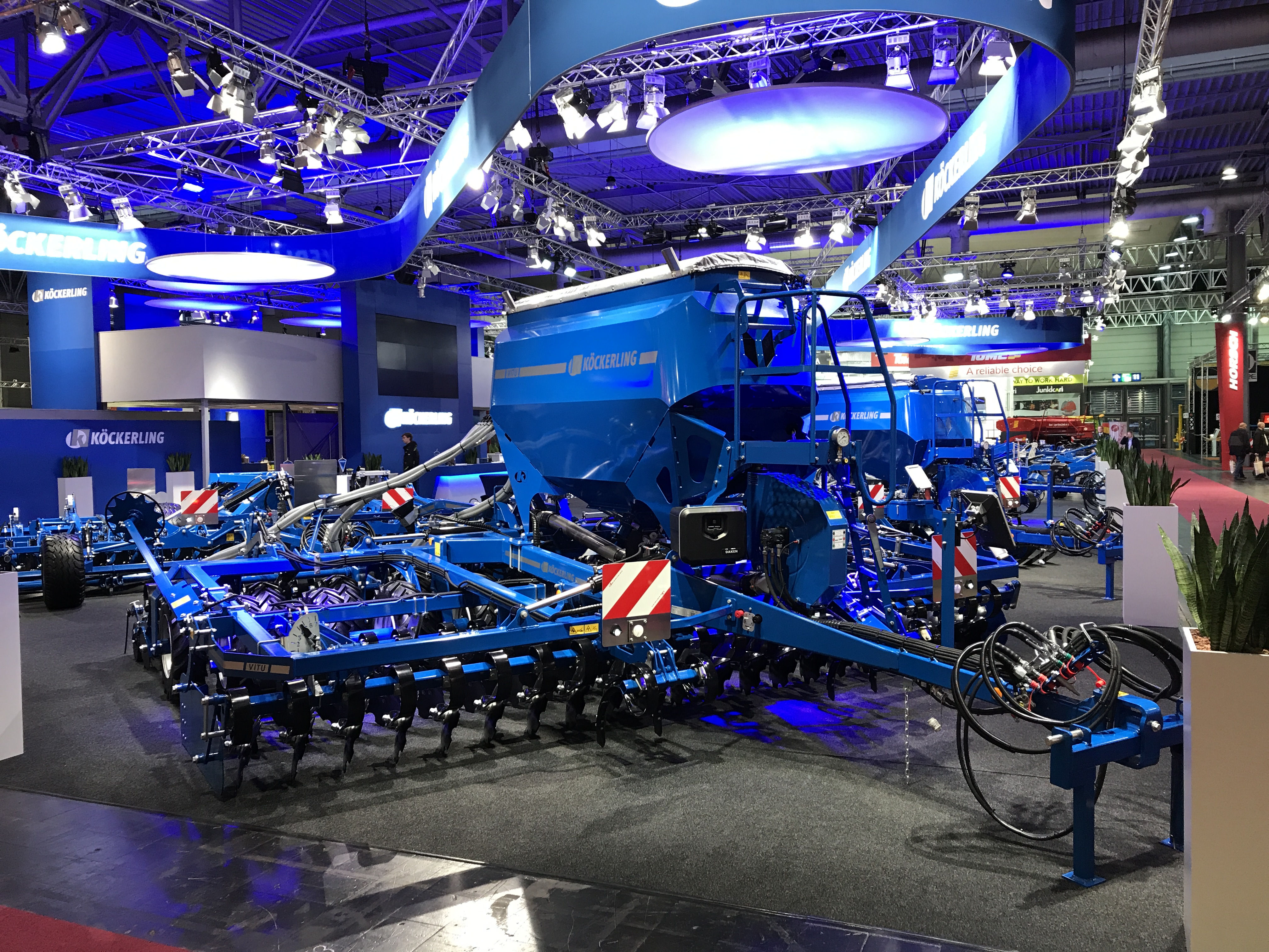 Messestand der Köckerling GmbH und Co. KG auf der Messe Agritechnica in Hannover im Jahr 2019.